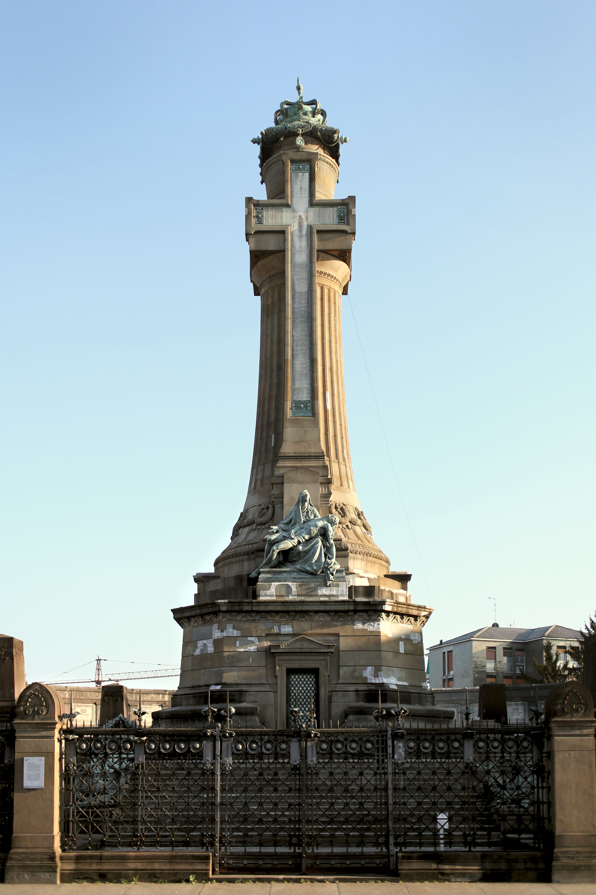 Cappella Espiatoria di Monza a memoria di re Umberto I (1910), colonna